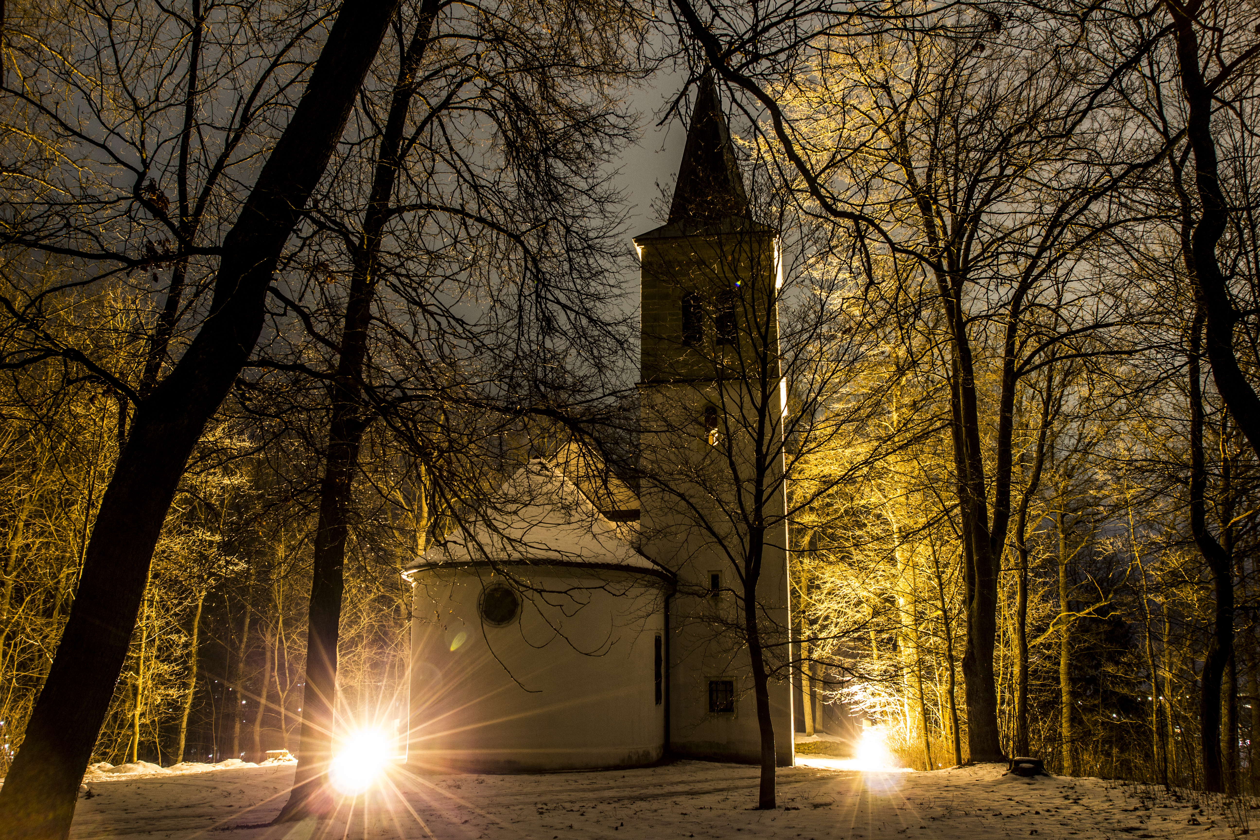 Maria-Hilf-Kirche auf dem Annaberg Grafenwöhr